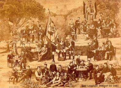 Aktivitas des Leipziger Wingolfs 1881